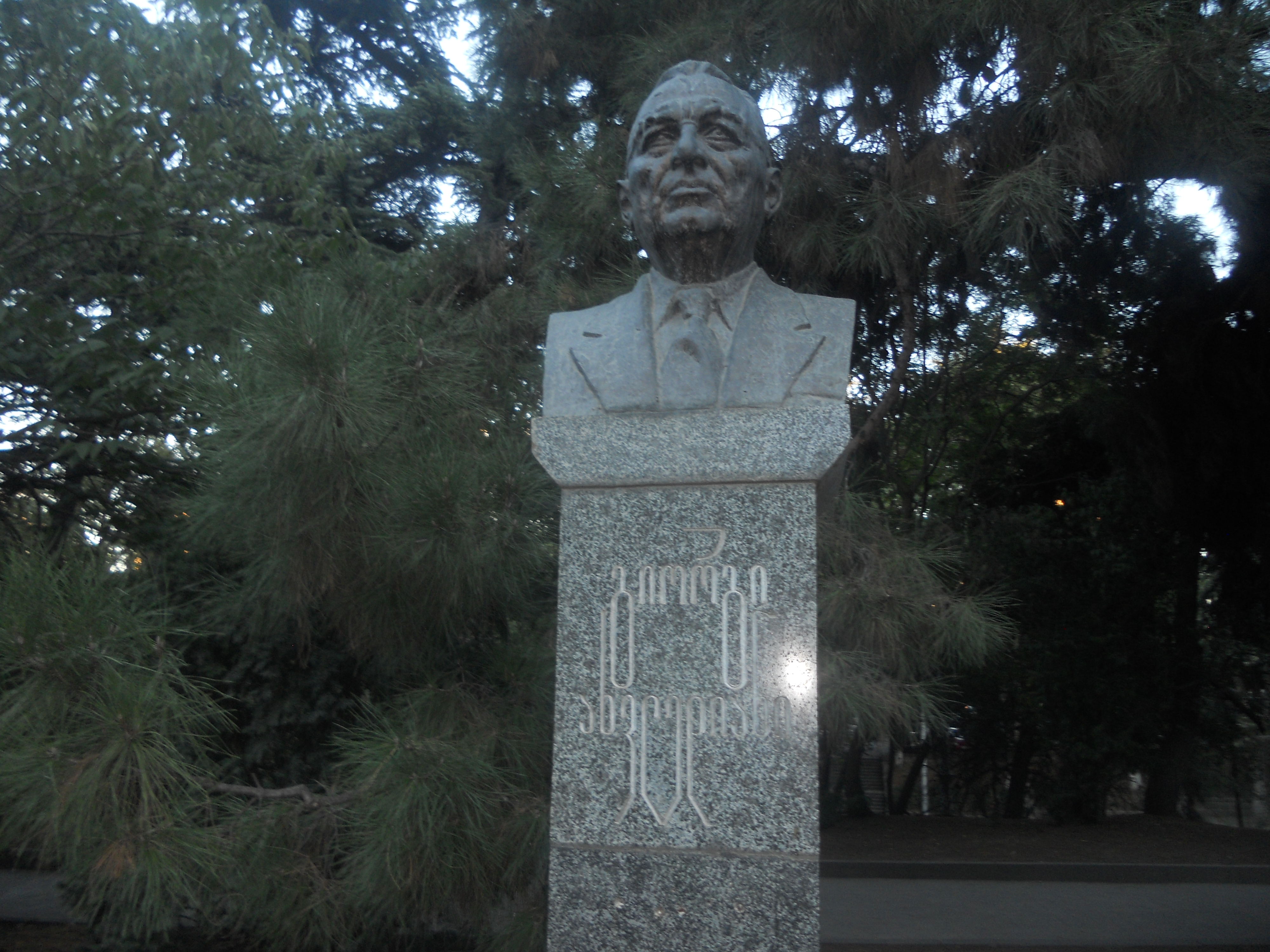 სახელმწიფო უნივერსიტეტის I კორპუსი